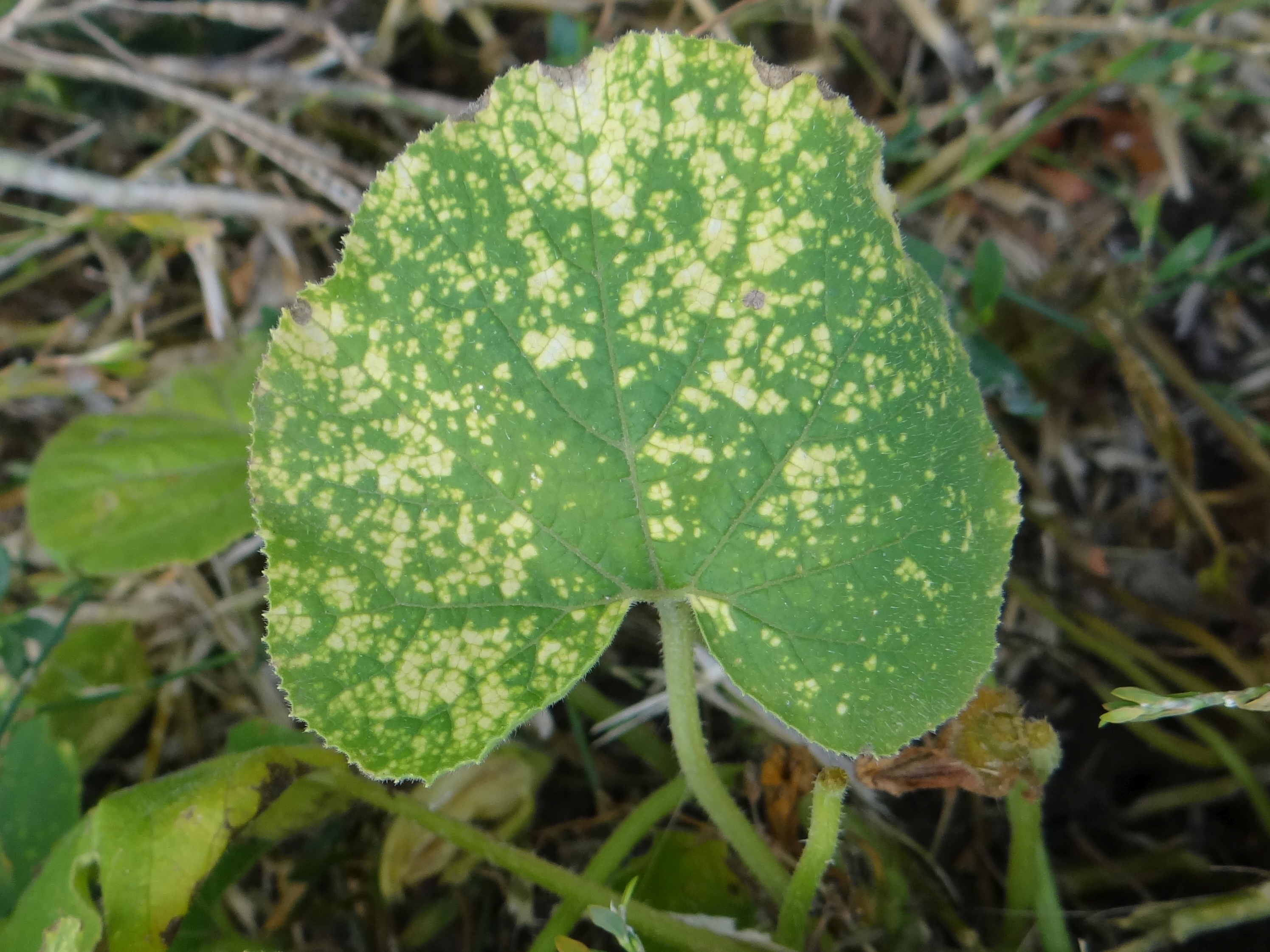 Pseudoperonospora cubensis on Cucumis melo